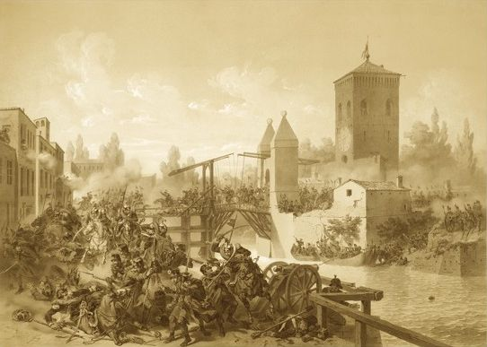 Battaglia di Governolo (18 luglio 1848)